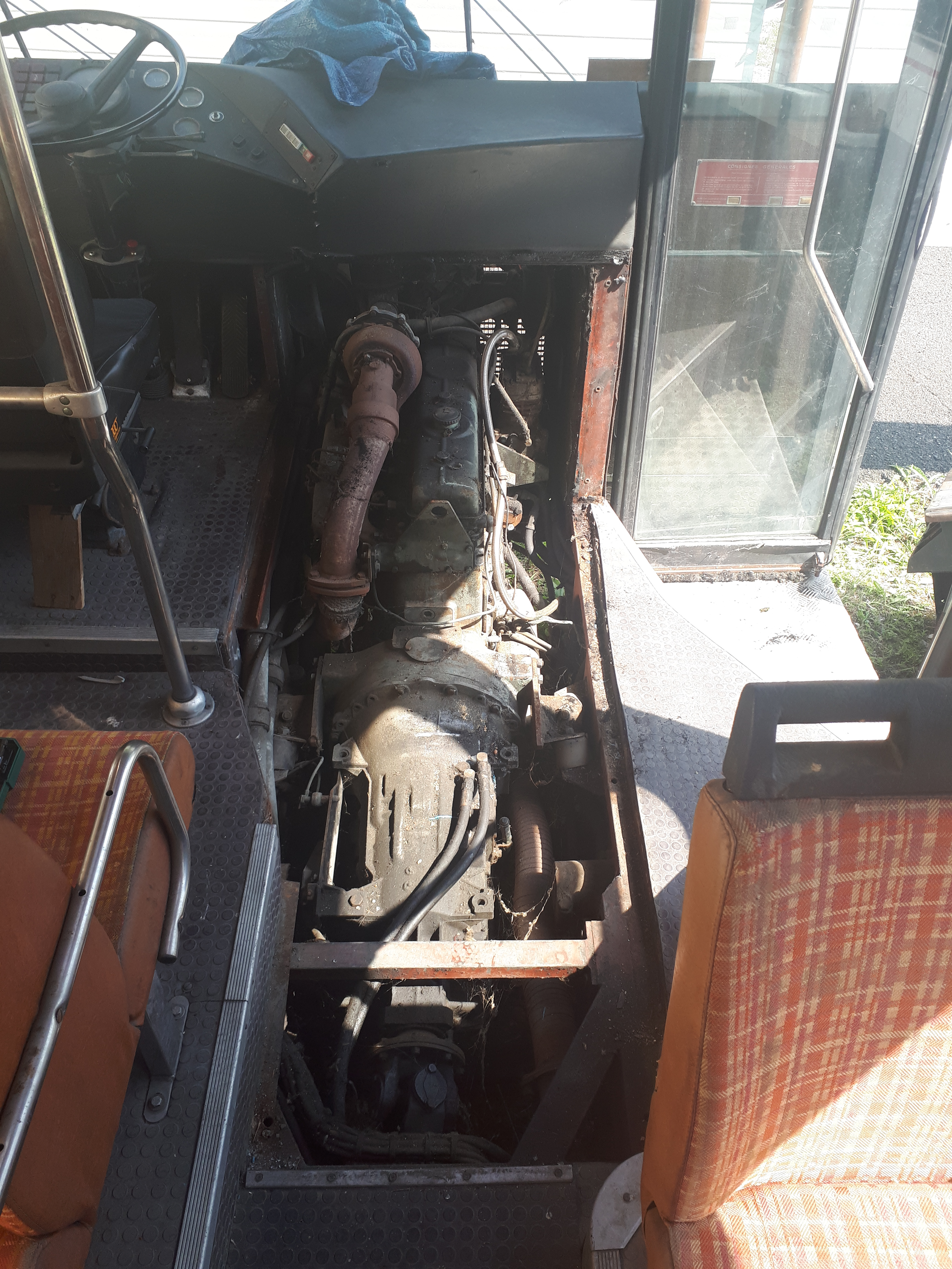 Moteur turbodiesel DAF DT615V et sa boîte automatique sur un CBM TDU 850S